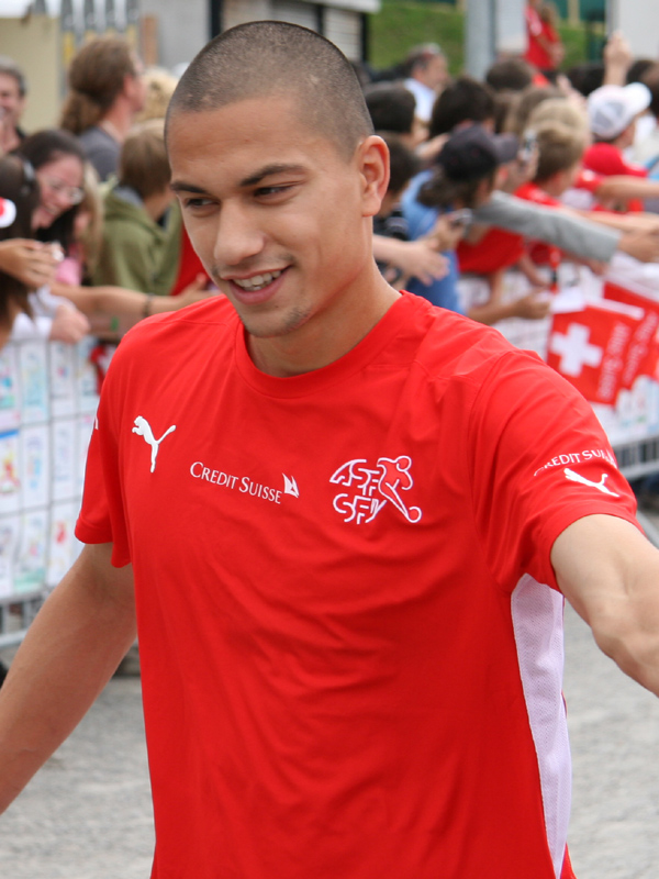 Gökhan Inler im Trainingslager der Schweizer Fussballnationalmannschaft vor der Euro 2008